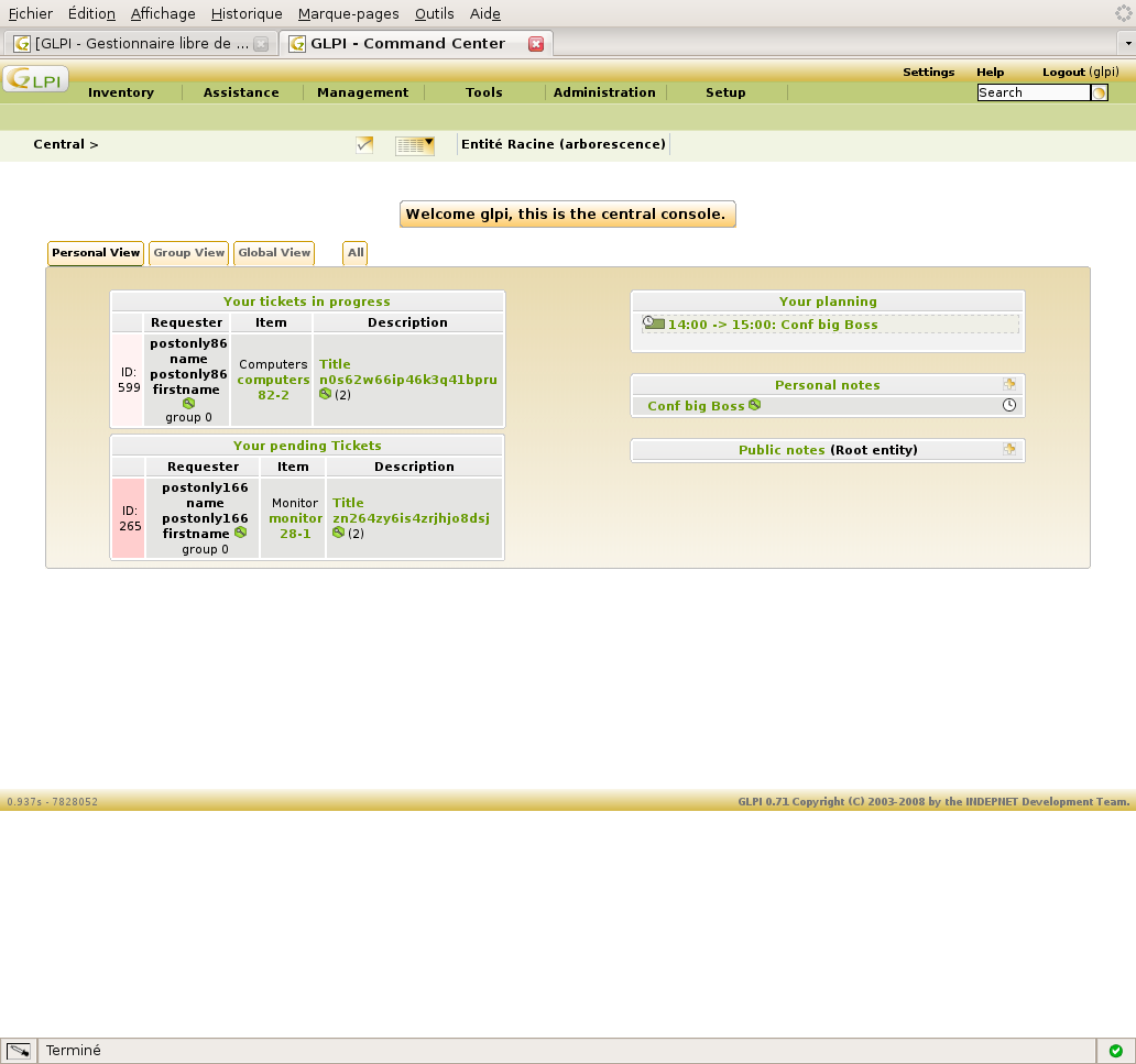 GLPI Central console